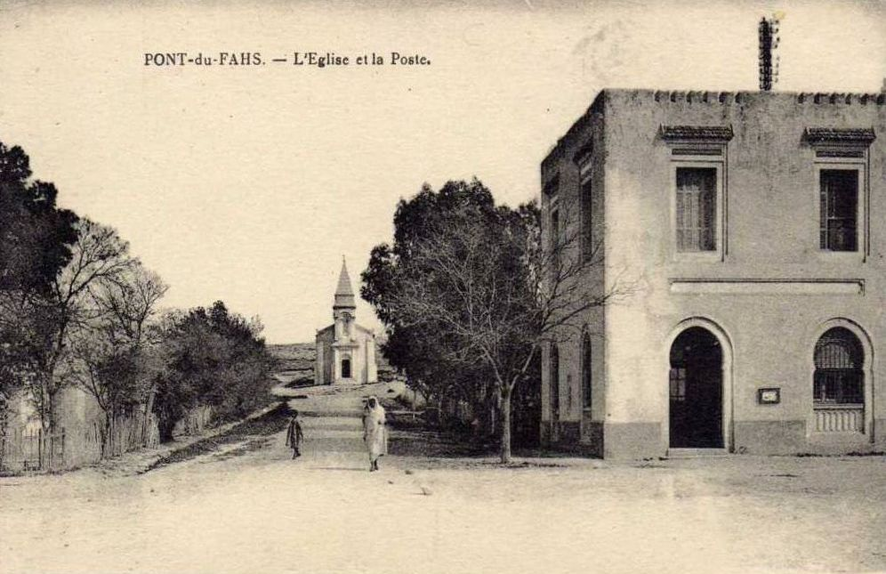 Église de Pont-du-Fahs aujourd'hui El Fahs en Tunisie dans les années 1940